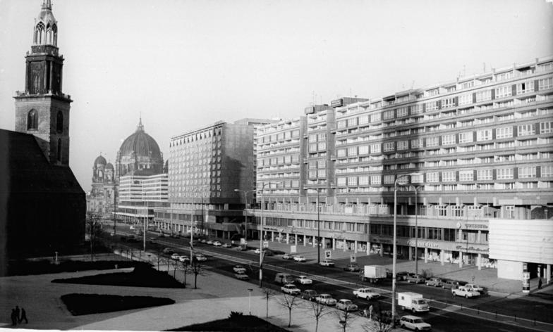 Berlin, Karl-Liebknecht-Straße, Marienkirche ADN-ZB Settnik 8.3.82 Berlin: Eine der bekanntesten Magistralen der Hauptstadt ist die Karl-Liebknecht-Straße mit der gotischen Marienkirche (links). Der von 1968 bis 1973 neu gestaltete Straßenzug verbindet den Marx-Engels-Platz mit dem Alexanderplatz. Information added by Wikimedia users.Die Wohnhäuser rechts sind Sonderbauten des Typs P2 (Spandauer Straße 4 / Karl-Liebknecht-Straße 7, sowie der Block Karl-Liebknecht-Straße 9 / 11 mit der Einkaufspassage Markthalle, heute Berlin-Carré). Dahinter (vor dem Berliner Dom) das ehemalige Palast-Hotel.